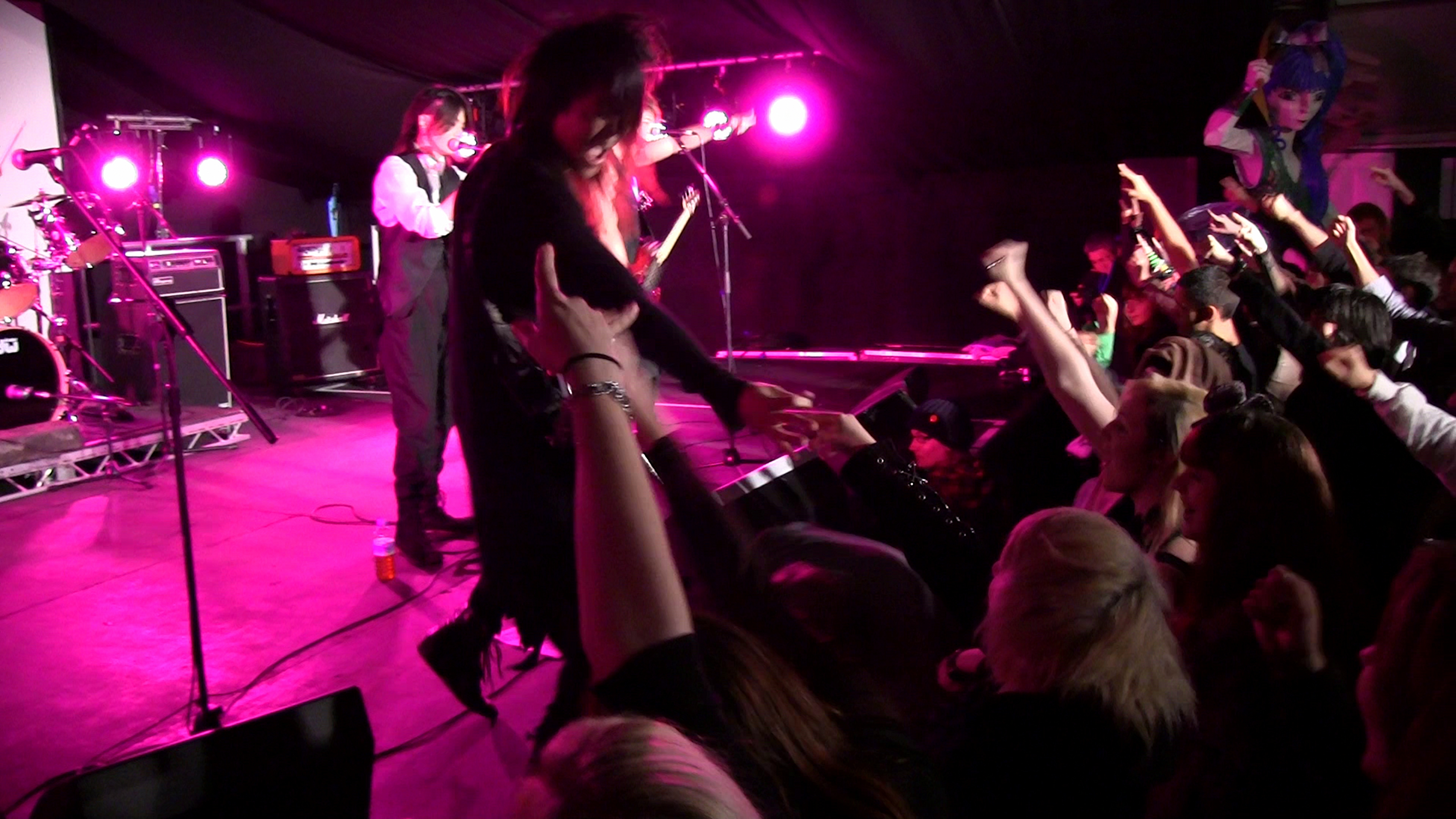 Esprit D'Air エスプリ デア - Brighton Japan Festival and Matsuri ブライ卜ン曰本フェステイバル祭